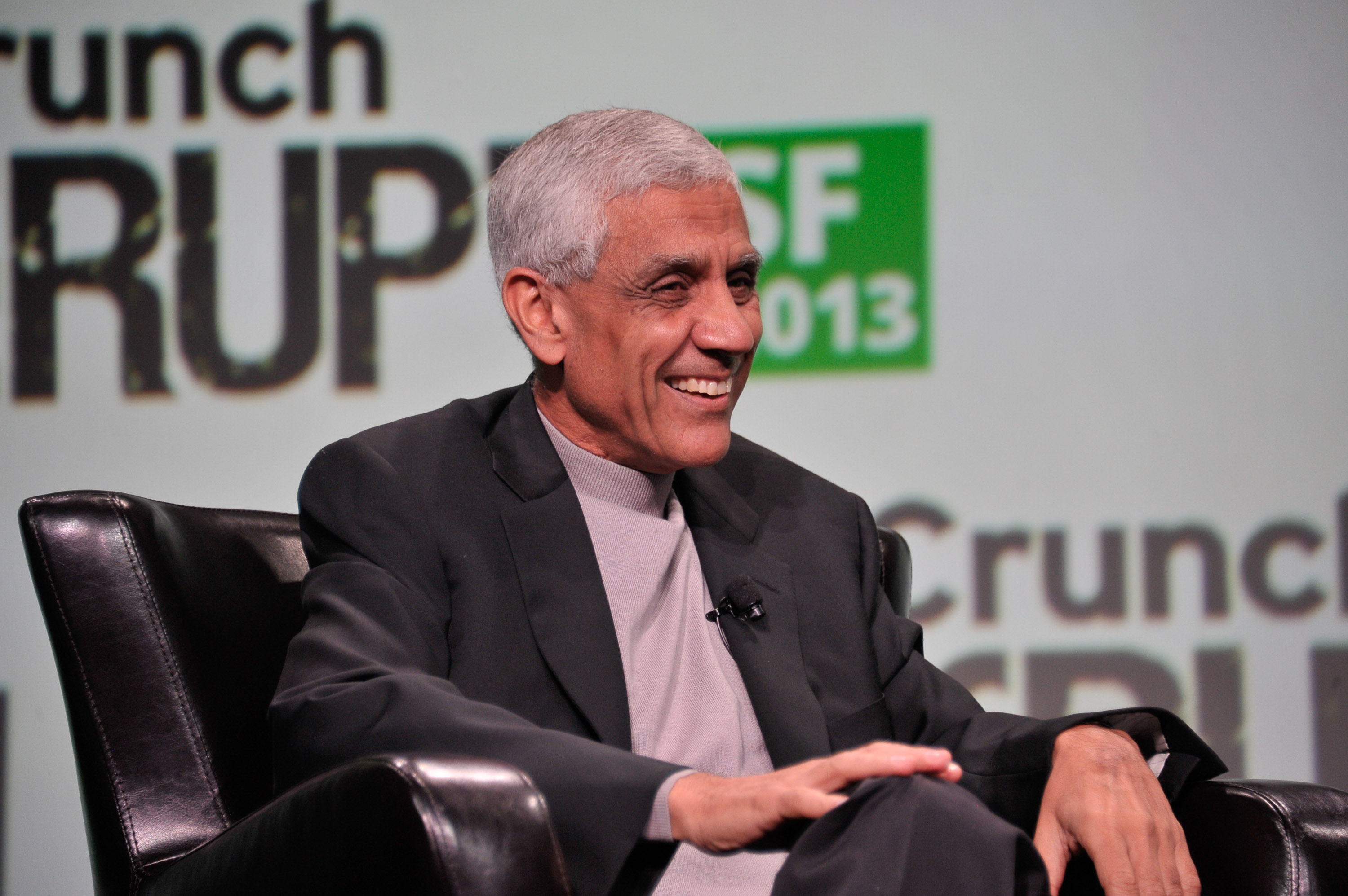 _SJP2484